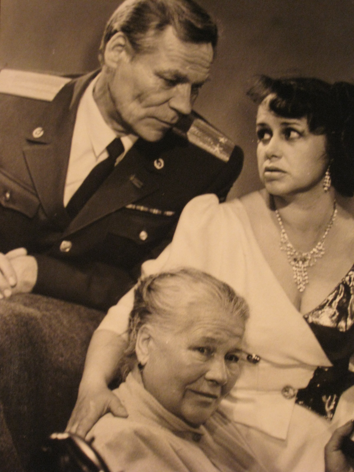 Театр "Патриот" спектакль "Дорогой подарок". Н.Мазаева, Т.Кудрявцева, Ю.Оськин, режиссёр-постановщик Егоров Геннадий Семёнович